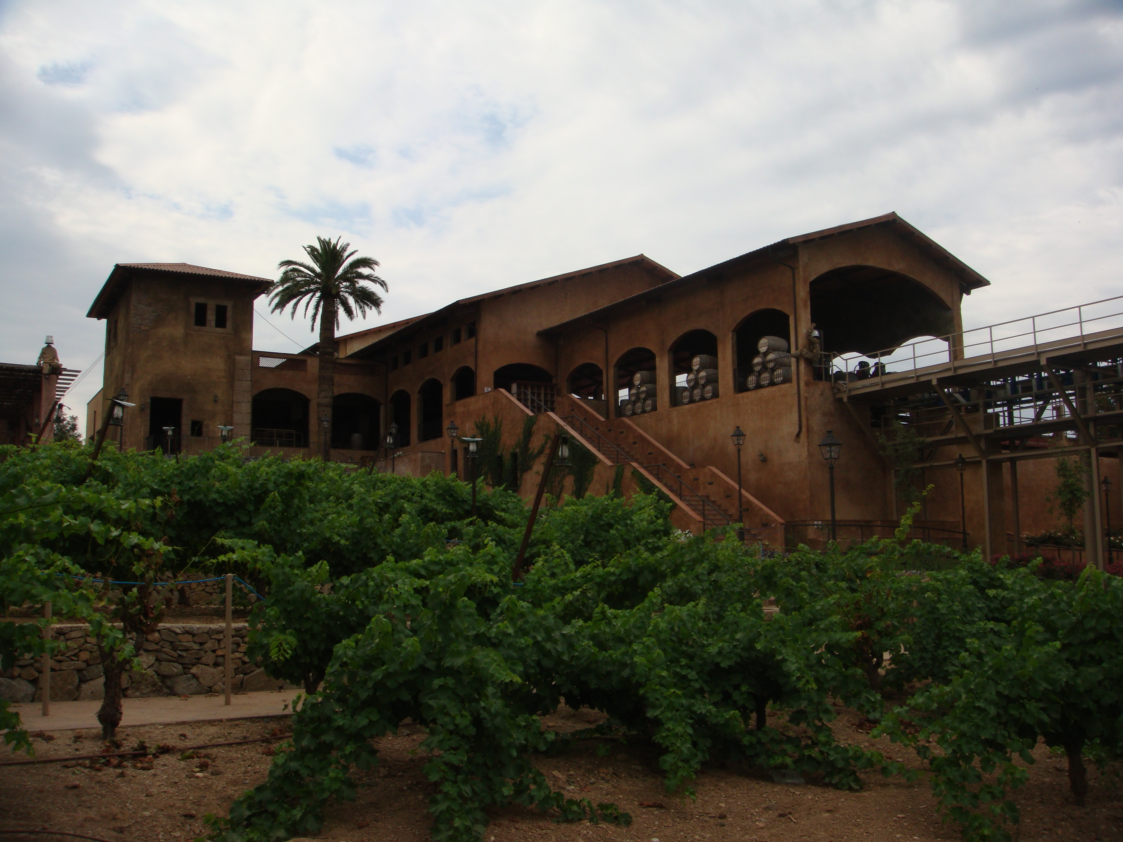 Caseta de entrada al Furius Baco.